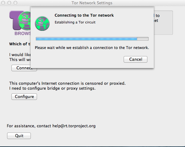 Tor-en instalazio pausuak